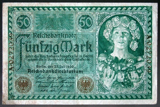 Banknote - 50 Mark - Deutsches Reich - 23.07.1920